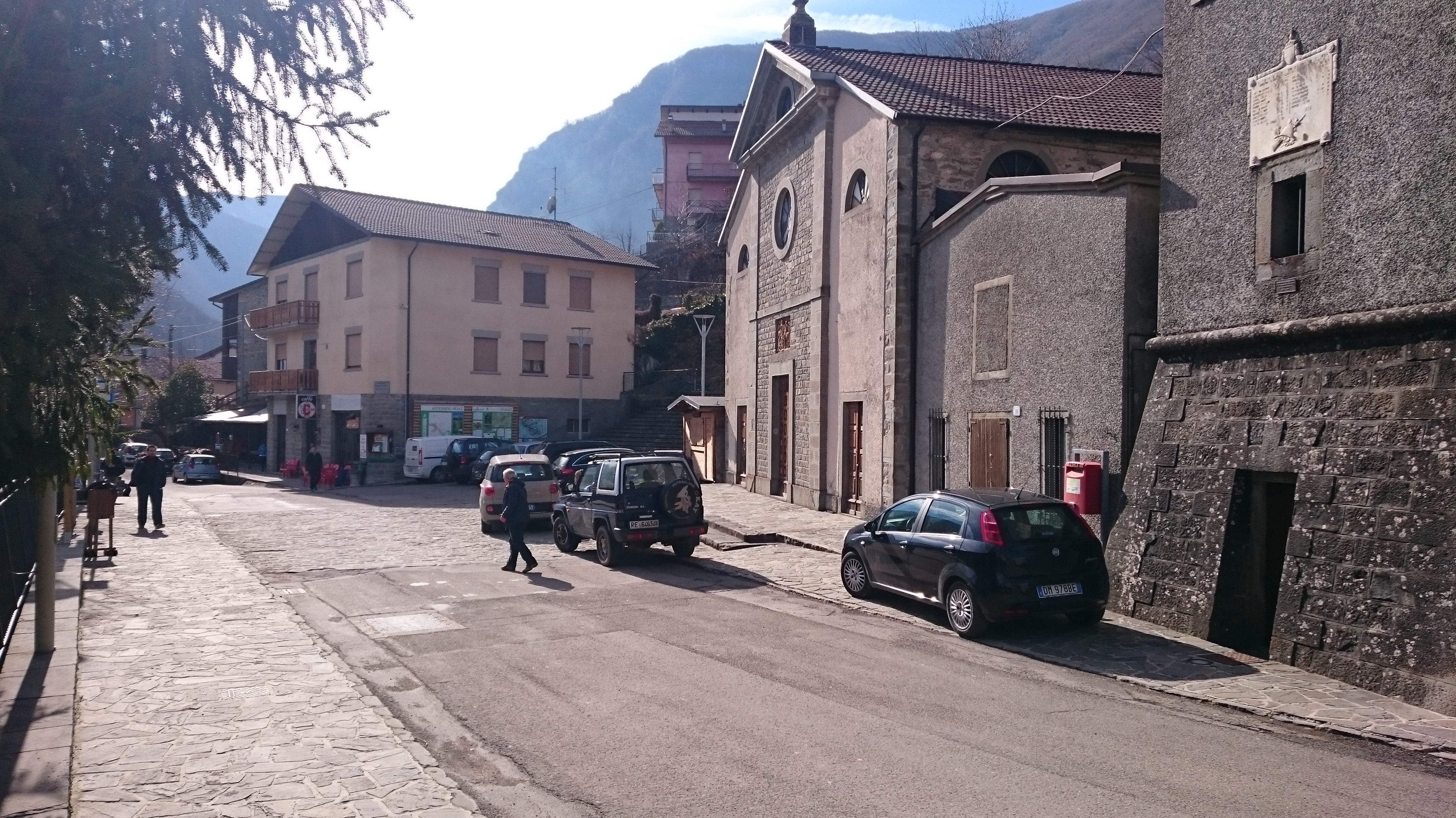 Frazione di Villa Minozzo